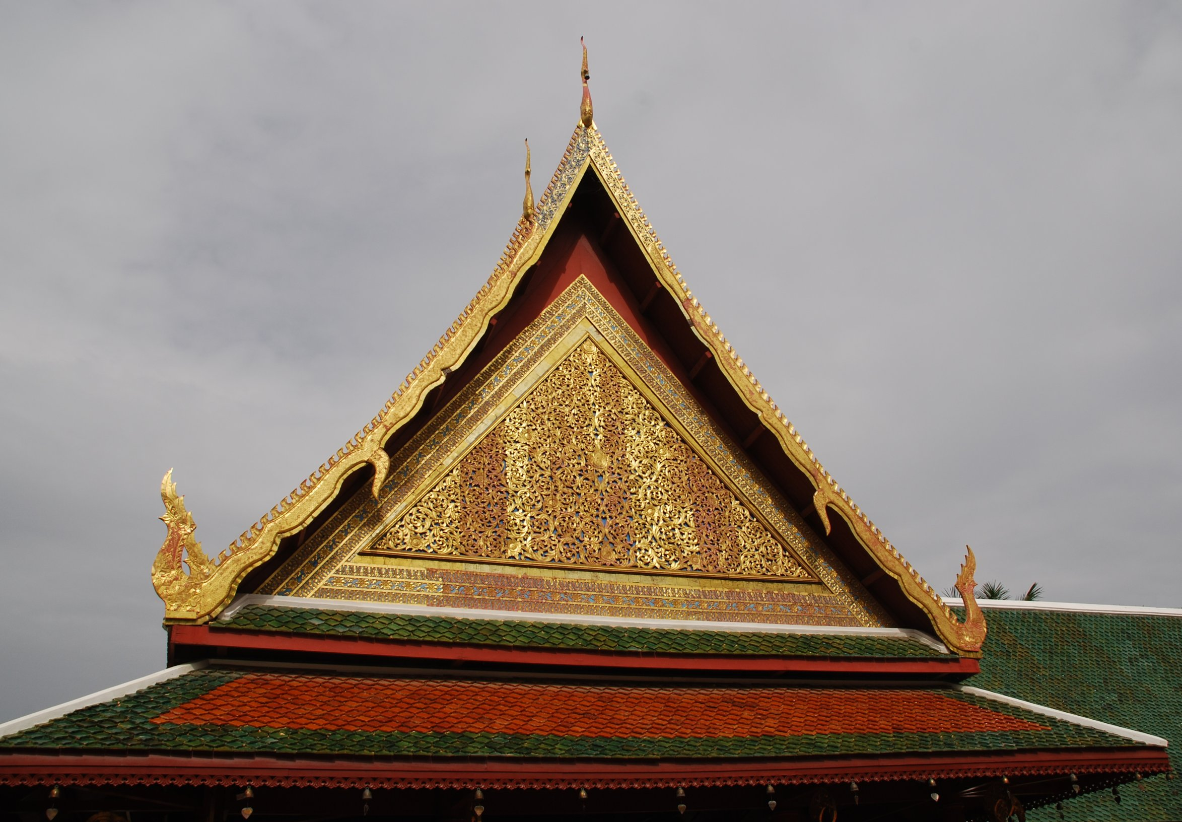 Loro Parque: Dachgiebel des Eingangsbereichs